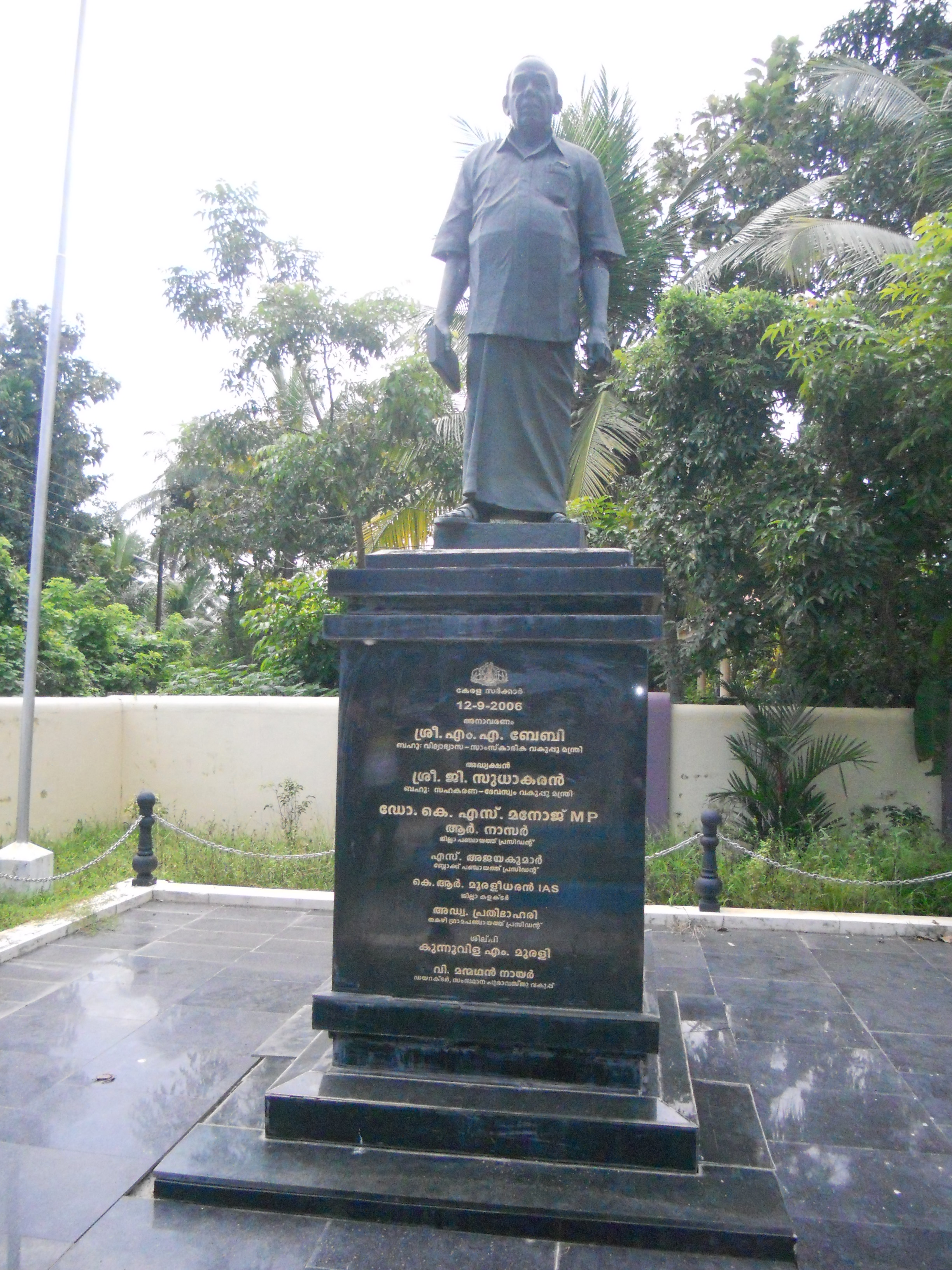 തകഴി സ്മാരകത്തിലെ പ്രതിമ